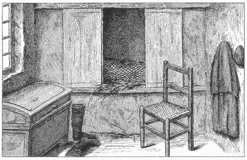 Abbildung aus: Braunschweiger Volkskunde, Richard Andree, Braunschweig, 1901 Sketch of wall bed in a Low German farmhouse, from Braunschweiger Volkskunde, Richard Andree, Brunswick, 1901, Germany.